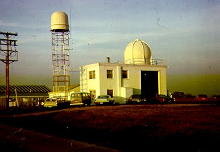 Photo du radar de la série WSR-1 du National Weather Service des États-Unis situé à l'aéroport de North Ohama, Nébraska (sur la tour) et de la station de radiosondage (l'édifice avec le dôme). Le radar fut en opération de 1954 à 1974 et fit partie du premier réseau national de radars météorologiques aux États-Unis. Il sera remplacé par un radar WSR-74C.